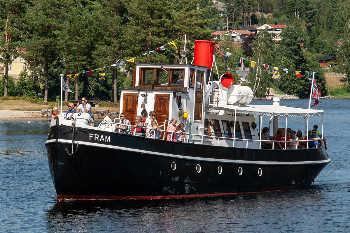 MS «Fram» på Eidstodpølen i Vrådal, på vei mot Småstraum sluse.